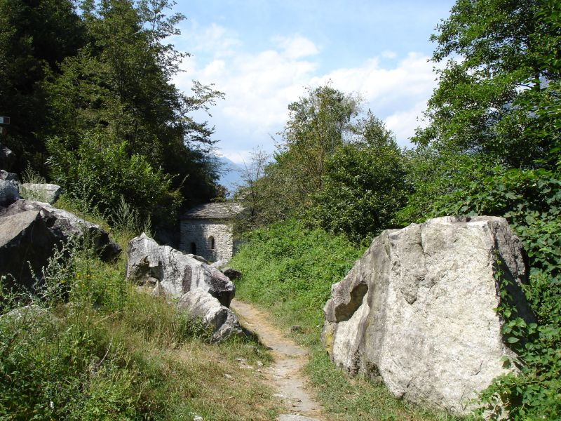 Chiesa di San Fedelino